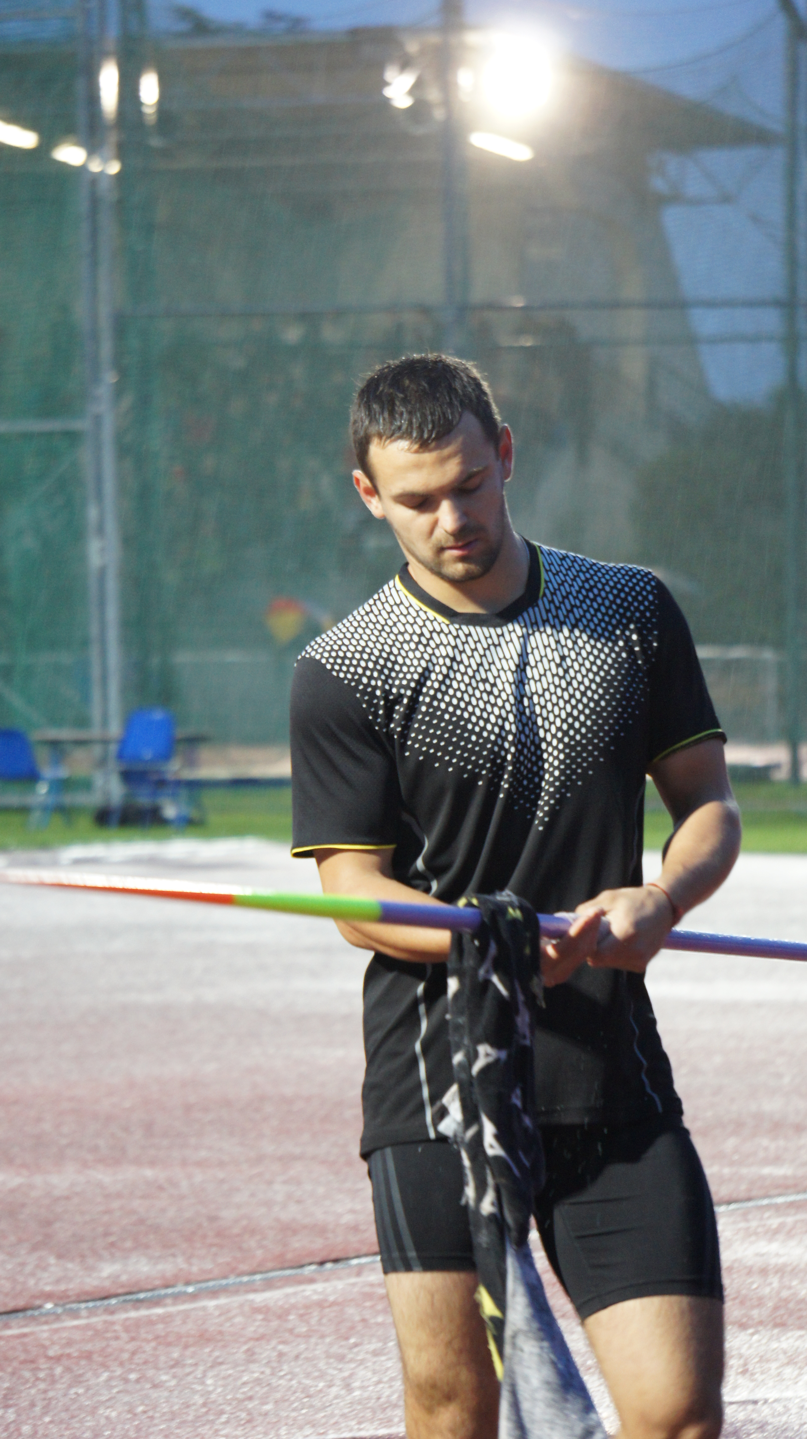 Roman Avramenko lors des Rencontres d'athlétisme de Reims 2013 .